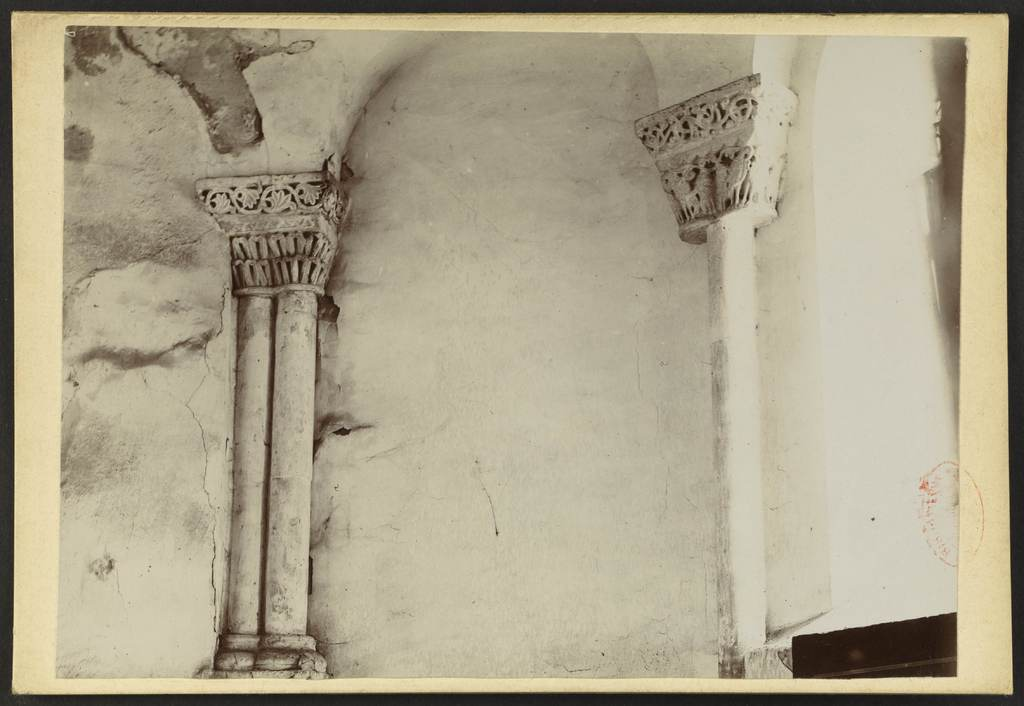 Eglise de Budos